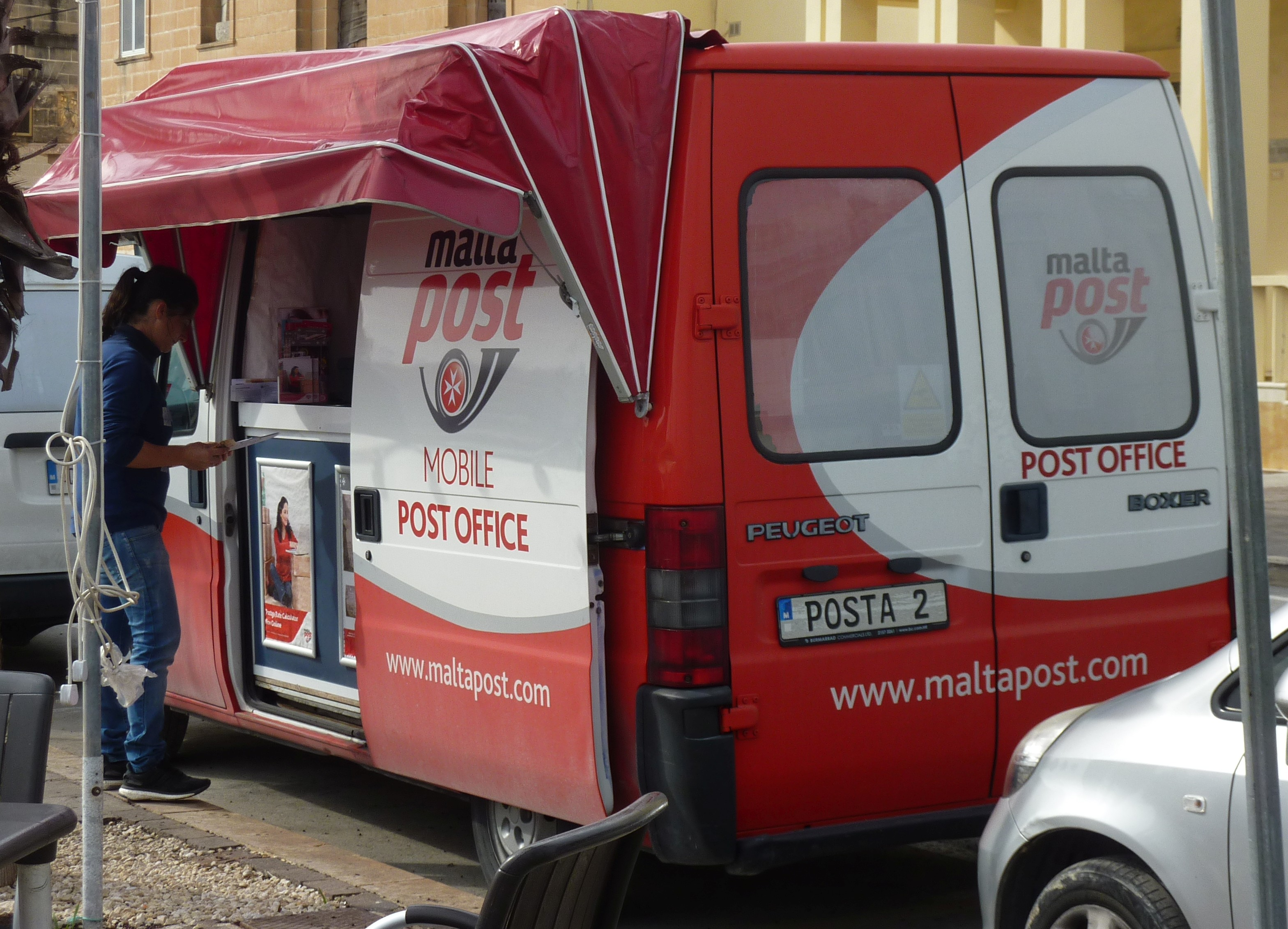 Mobilny urząd pocztowy na Malcie, z tablicą rejestracyjną POSTA